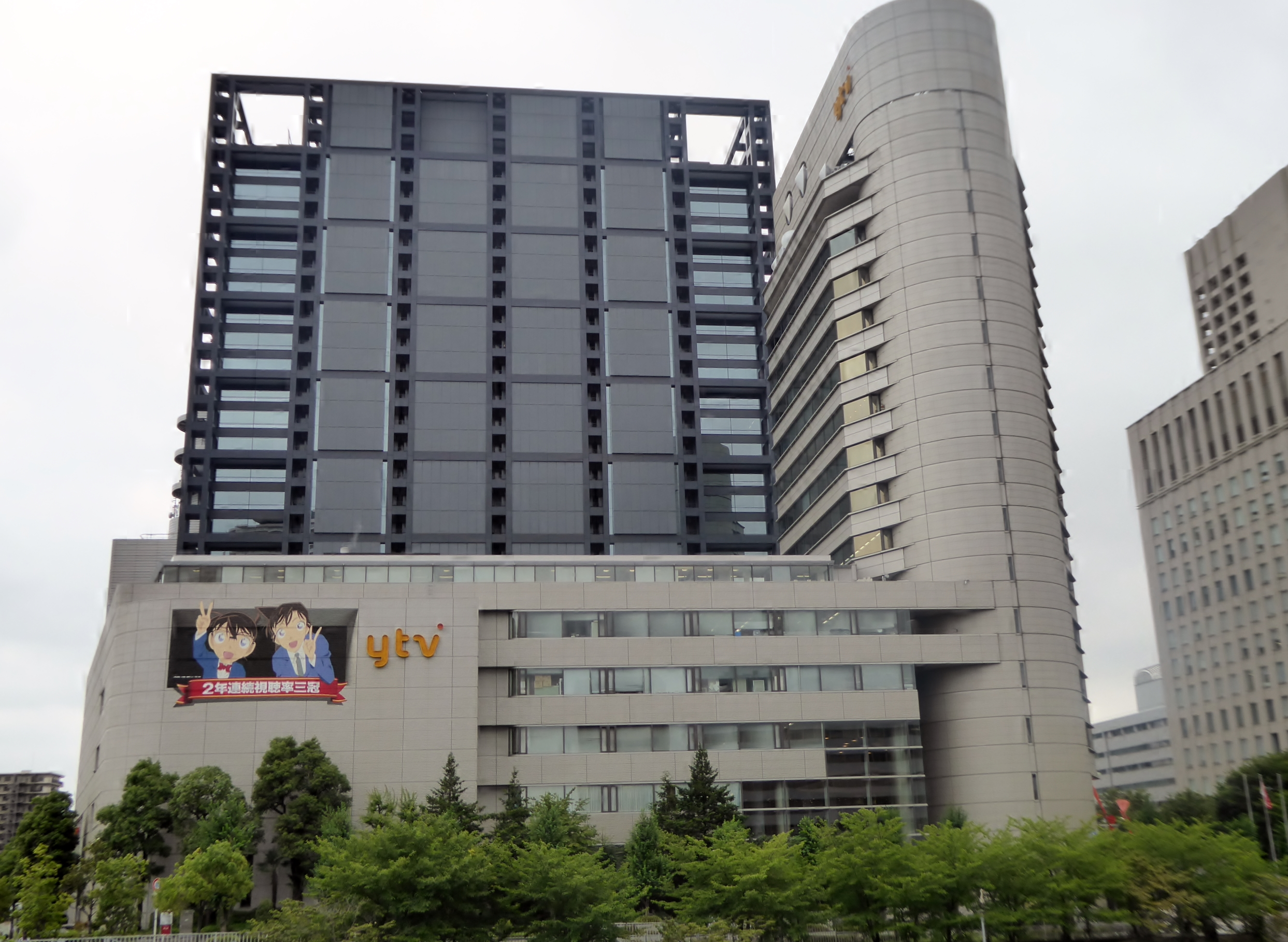 讀賣テレビ放送株式会社本社を撮影。